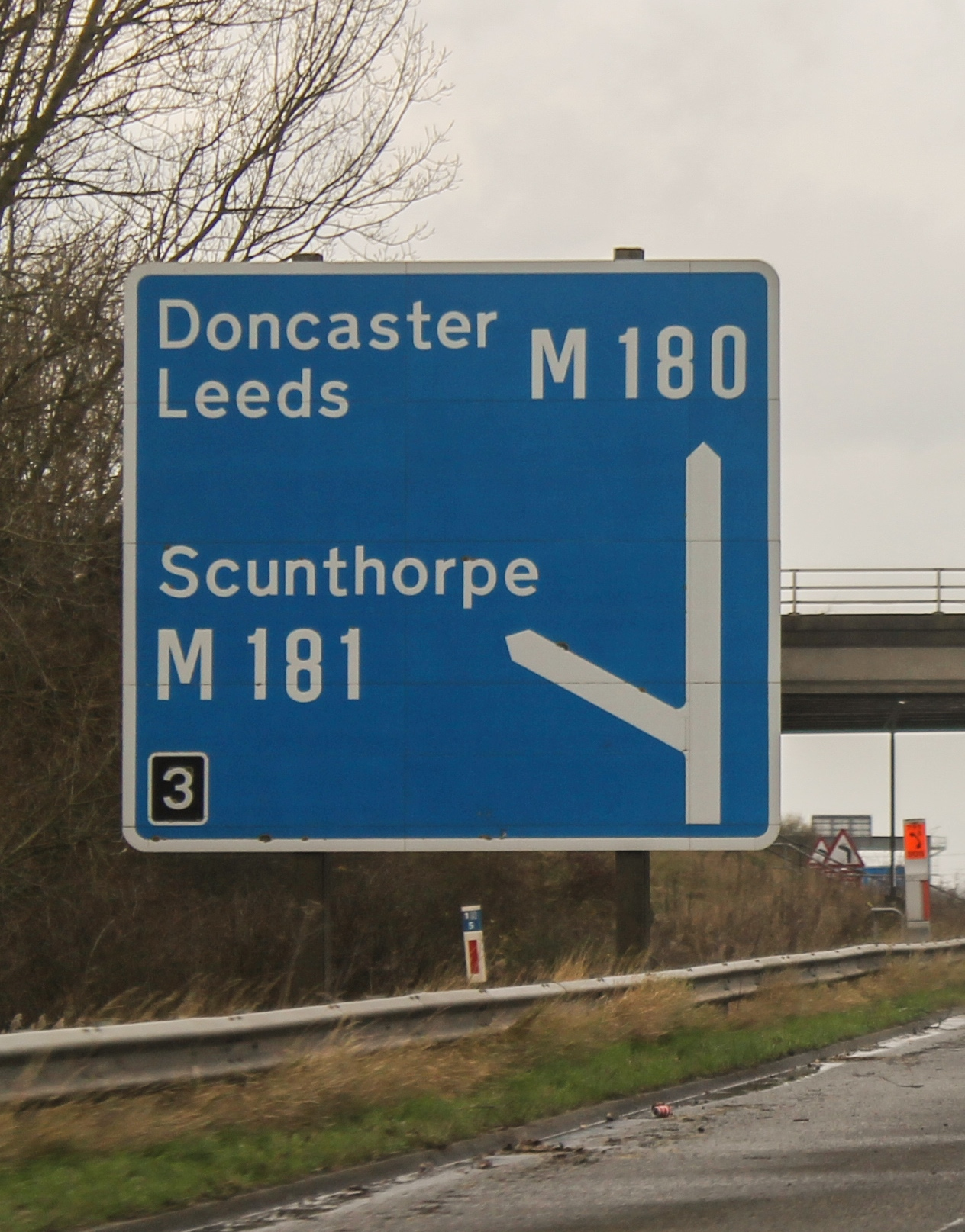 M180とM181を接続するジャンクションを示す標識。2015年12月に撮影されたものをトリミング。